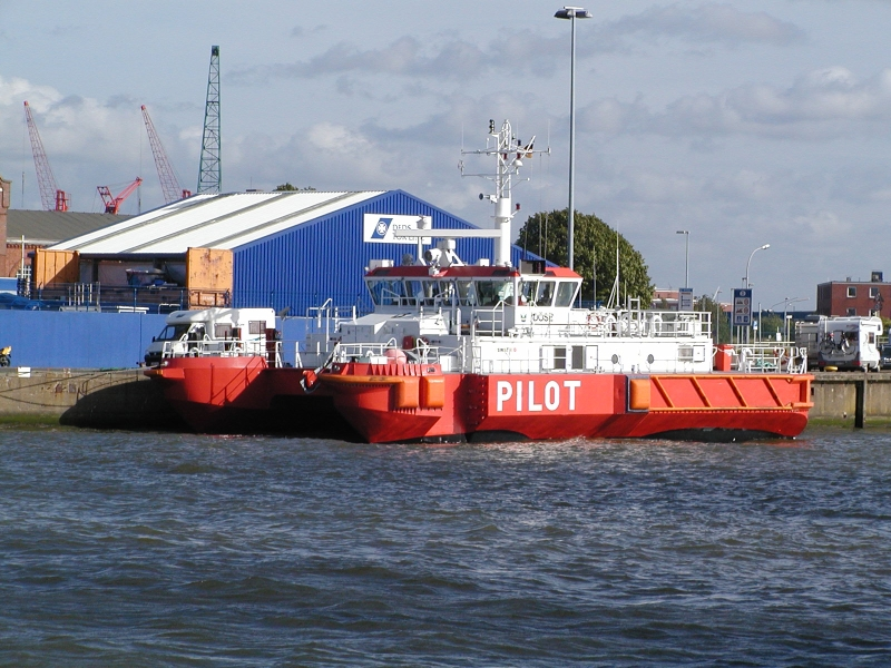 SWATH Pilot Döse